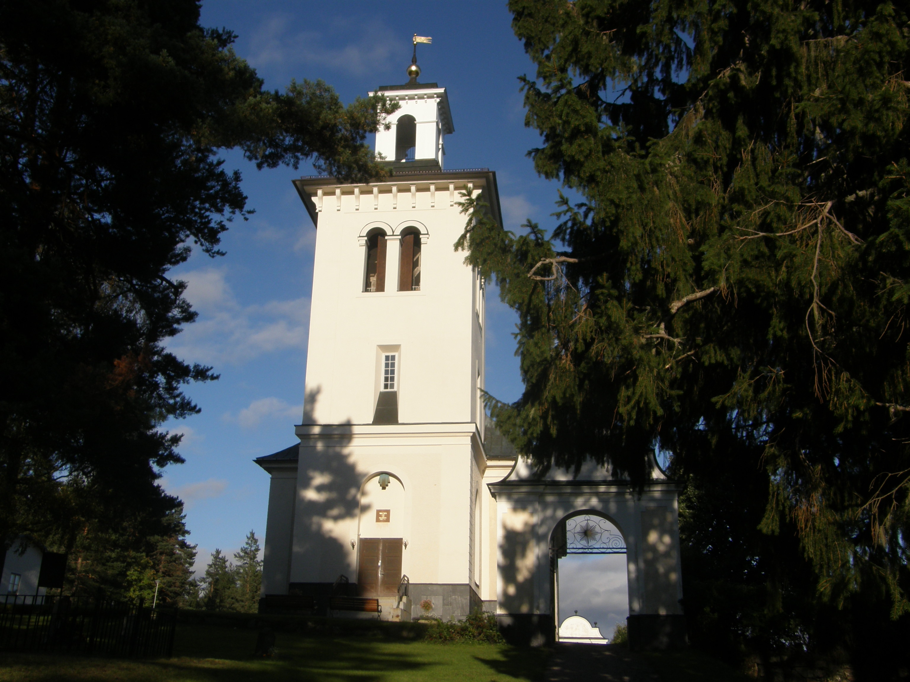 Hässjö kyrka framifrån